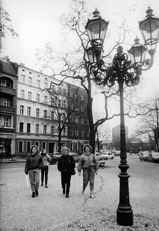 Berlin, Tuchollaplatz ADN-ZB Reiche 15.2.1989 Berlin: Wahlbilanz-Die Rekonstruktionsarbeiten am Tuchollaplatz im Stadtbezirk Lichtenberg sind größtenteils abgeschlossen. Fortgesetzt werden sie jetzt in den abzweigenden Seitenstraßen, wo 95 Wohnungen modernisiert werden. Der Platz besitzt seinen eigenen Reiz zu jeder Jahreszeit, besonders anziehend aber ist er im Herbst, wenn zu den Markttagen eigeladen wird. - siehe auch 33N